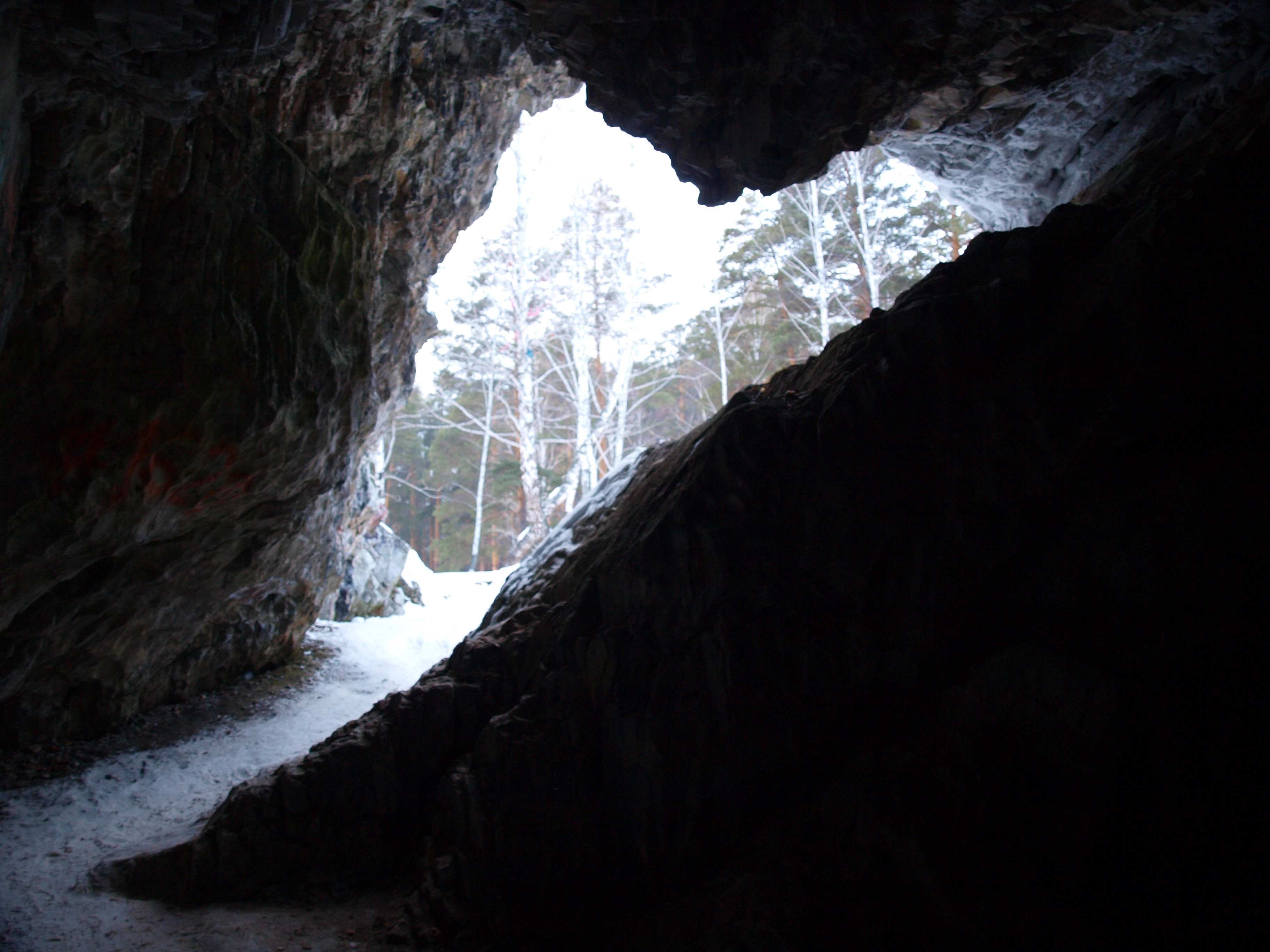 Сугомакская пещера. Вид на вход из пещеры. Зима